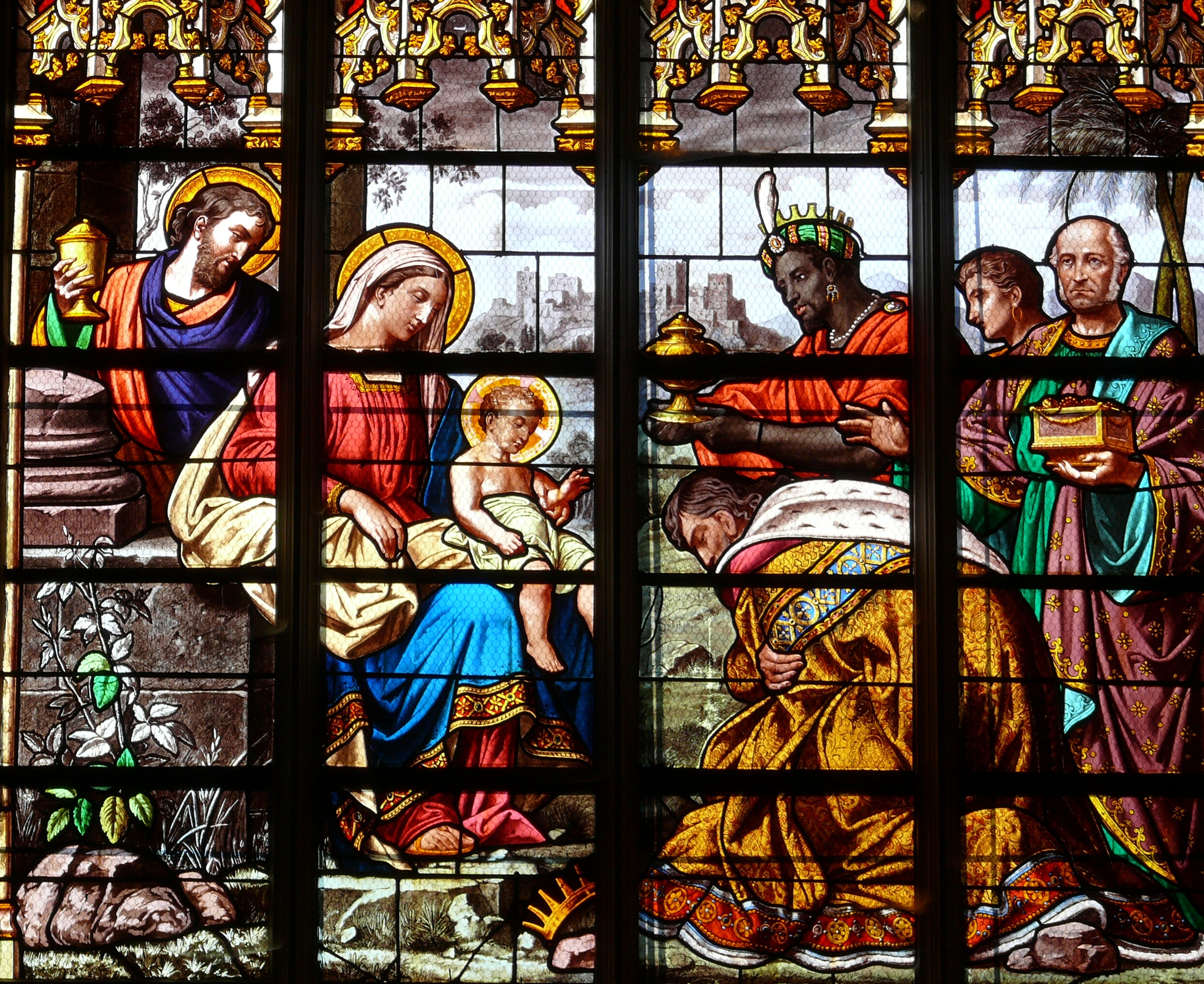 Egrevlle - Eglise Saint-Martin - Vitrail de l'Adoration des Mages